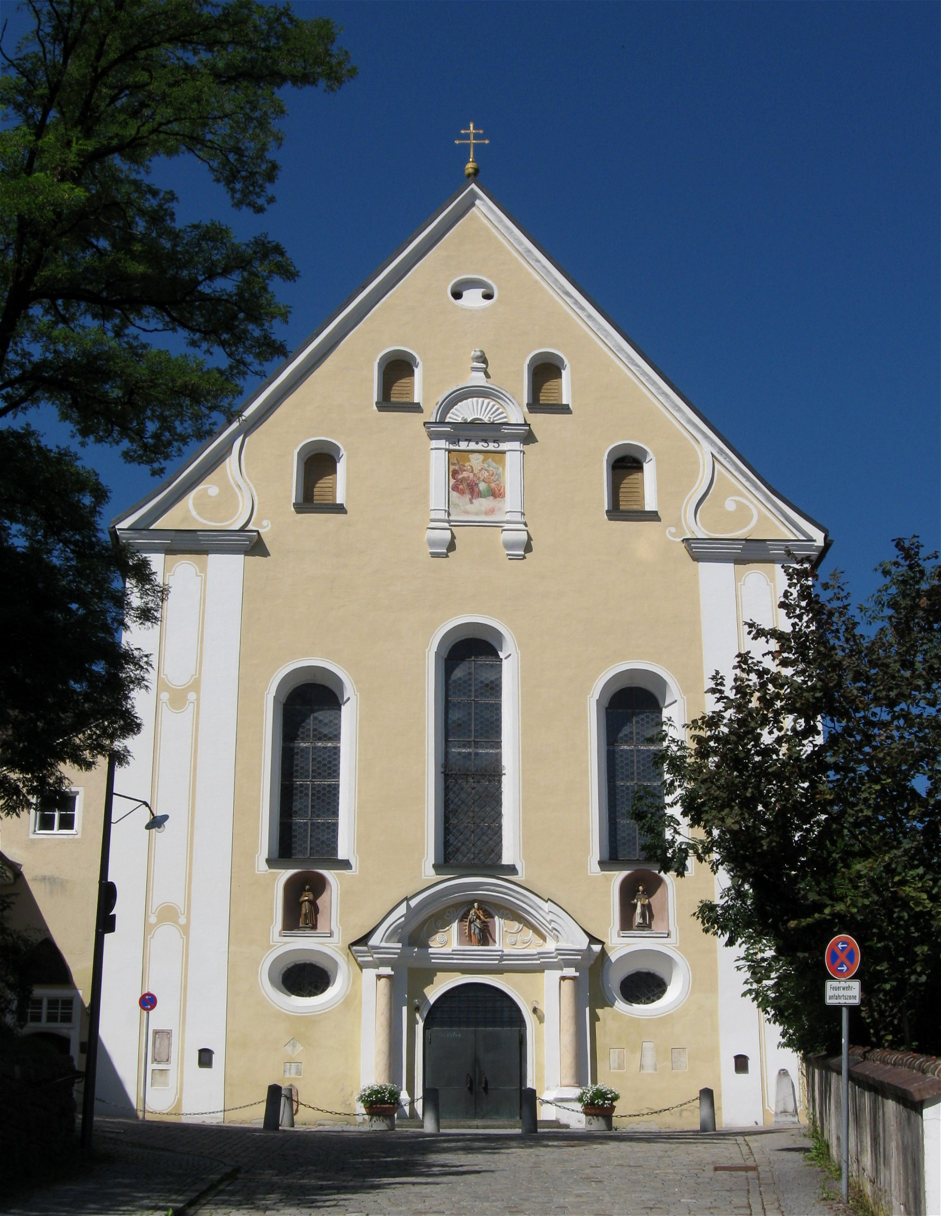 Franziskanerkloster; kath. Klosterkirche Hl. Dreifaltigkeit, barocker Wandpfeilersaal mit ausgeschiedenem Chor, Psallierchor und Dachreiter, von Aichardus Holzleithner, 1733-35; mit Ausstattung; Konventgebäude, dreigeschossige mehrflügelige Anlage mit Walmdächern, etwa gleichzeitig, später verändert; ehem. Friedhofsmauer, Mauer des 1922 aufgelassenen Friedhofs; Kriegergedenkstätte, Steinsarkophag zwischen steinernen kugelbesetzten Stehlen, 1927.